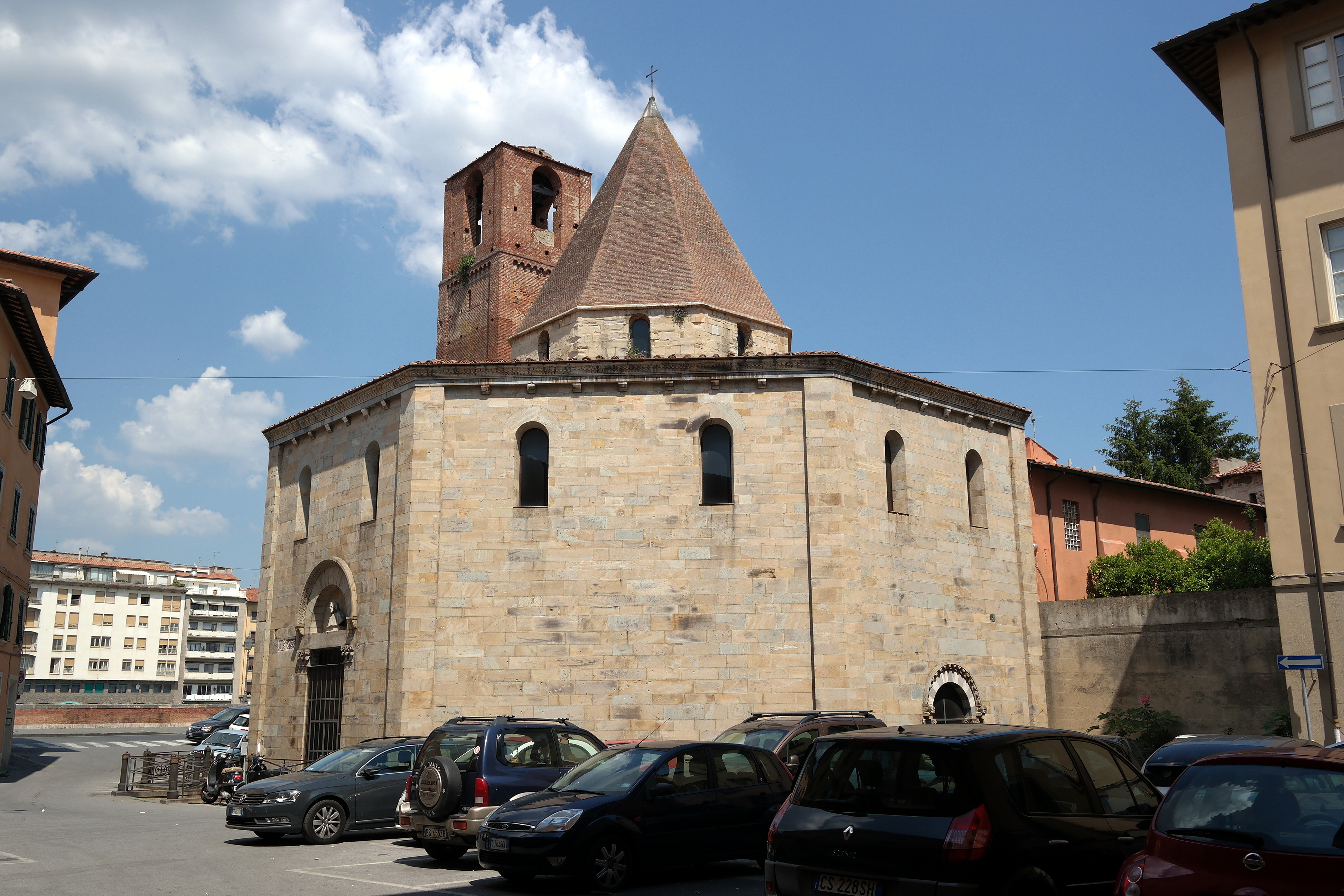 Chiesa del Santo Sepolcro a Pisa